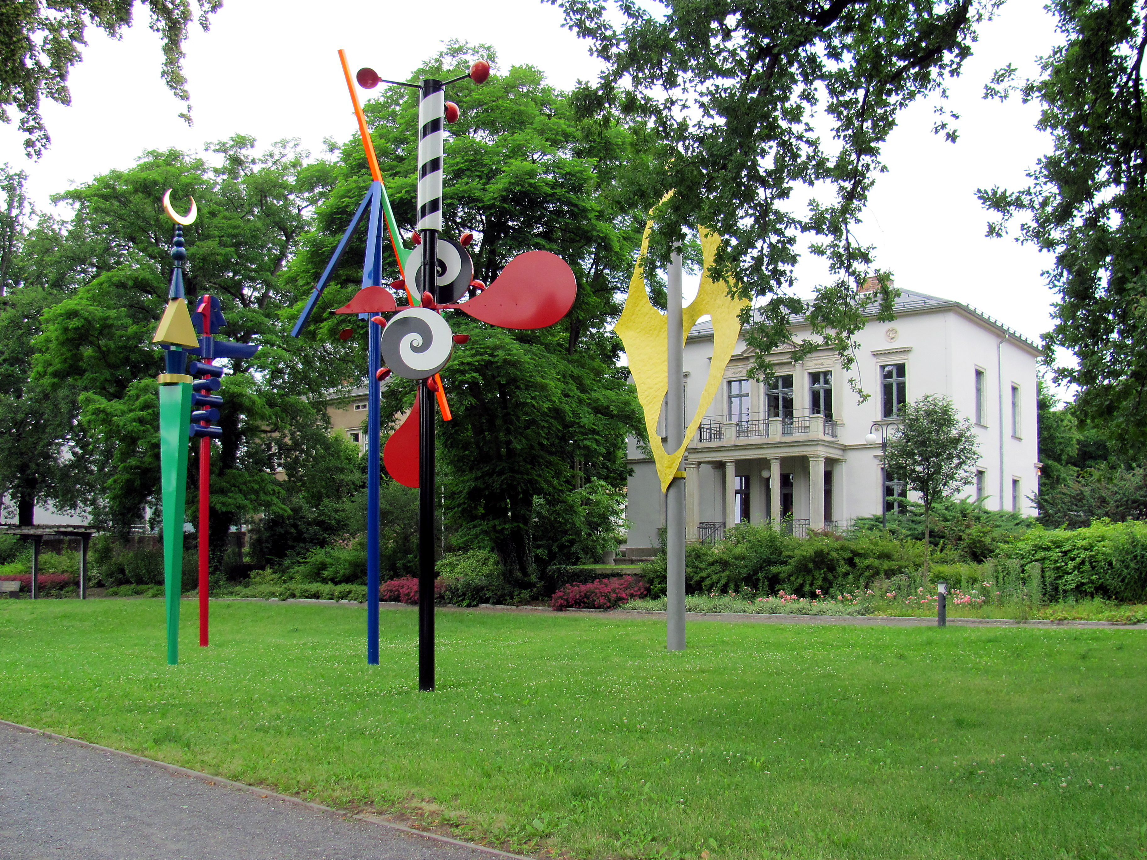 Radebeul-Mitte Skulpturenpark